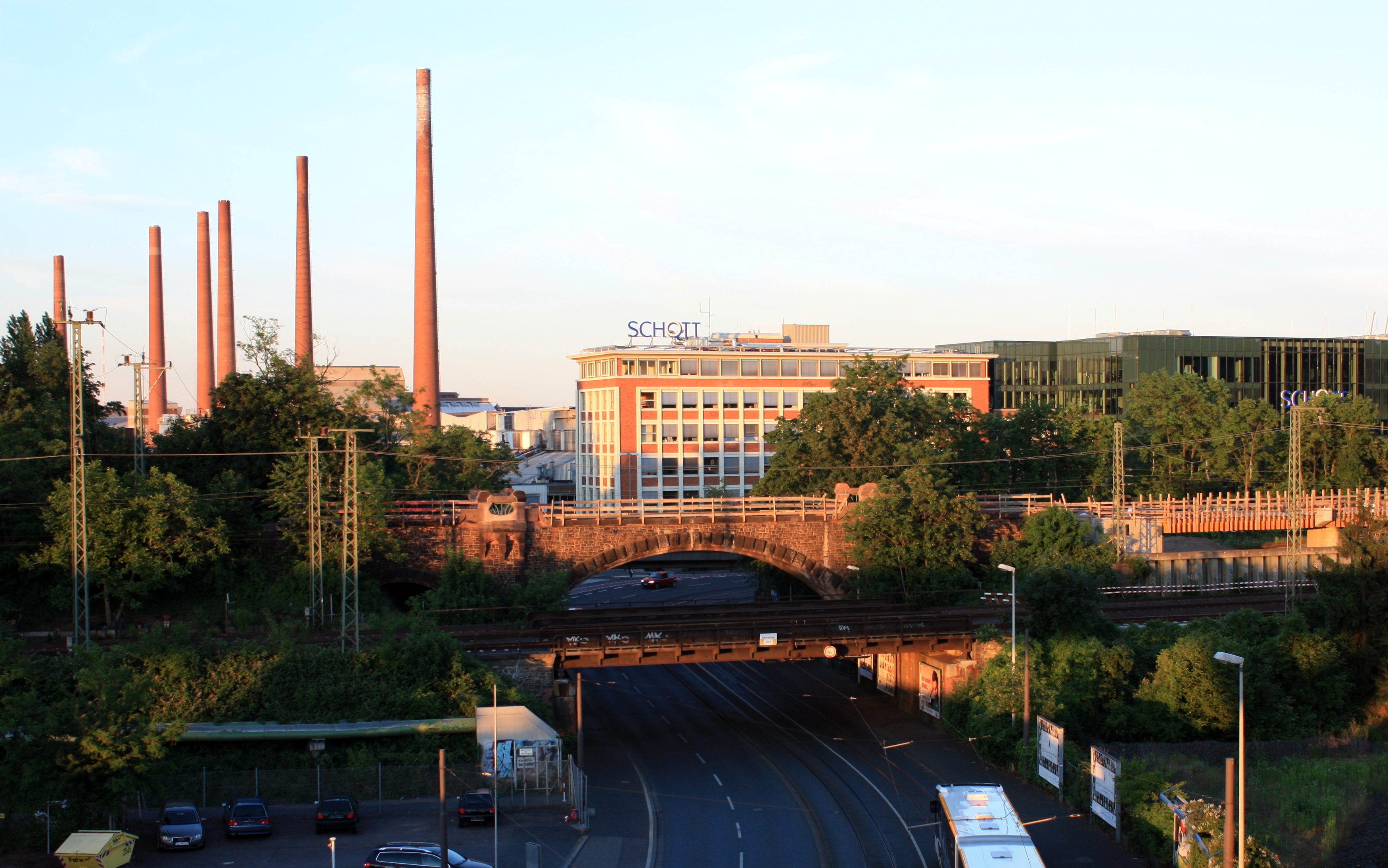 Schott Glas - Schornsteingruppe und Verwaltungsgebäude des Architekt Ernst Neufert von 1951-1953 aufgenommen in Mainz am 06. Juni 2014. Das Foto entstand in den Abendstunden von der Brücke der K17. Im Vordergrund die Hattenbergstraße mit den drei Eisenbahnüberführungen. Die mittlere Eisenbahnüberführung schließt direkt an den Neubau des Mainzer Nordkopf (MNK) an.